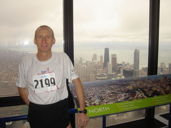 Stefan Schlett finished Megaevent "Go Vertical Chicago 2008"